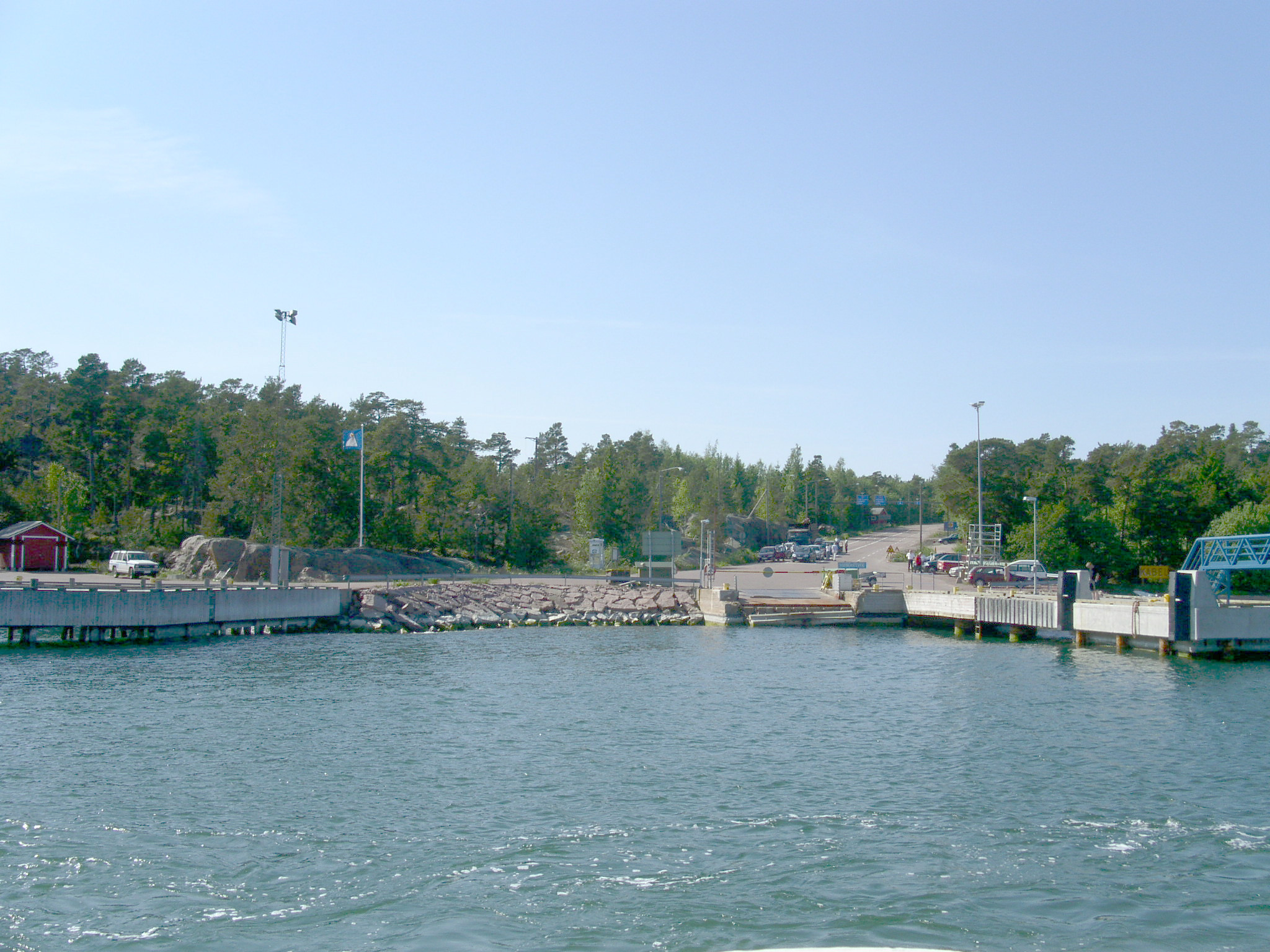 färjefästet Hummelvik på Vårdö, Åland, utgångshamn för "norra linjen" österut till Kumlinge och Brändö